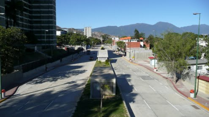 avenida intercomunal El valle, coche, caracas